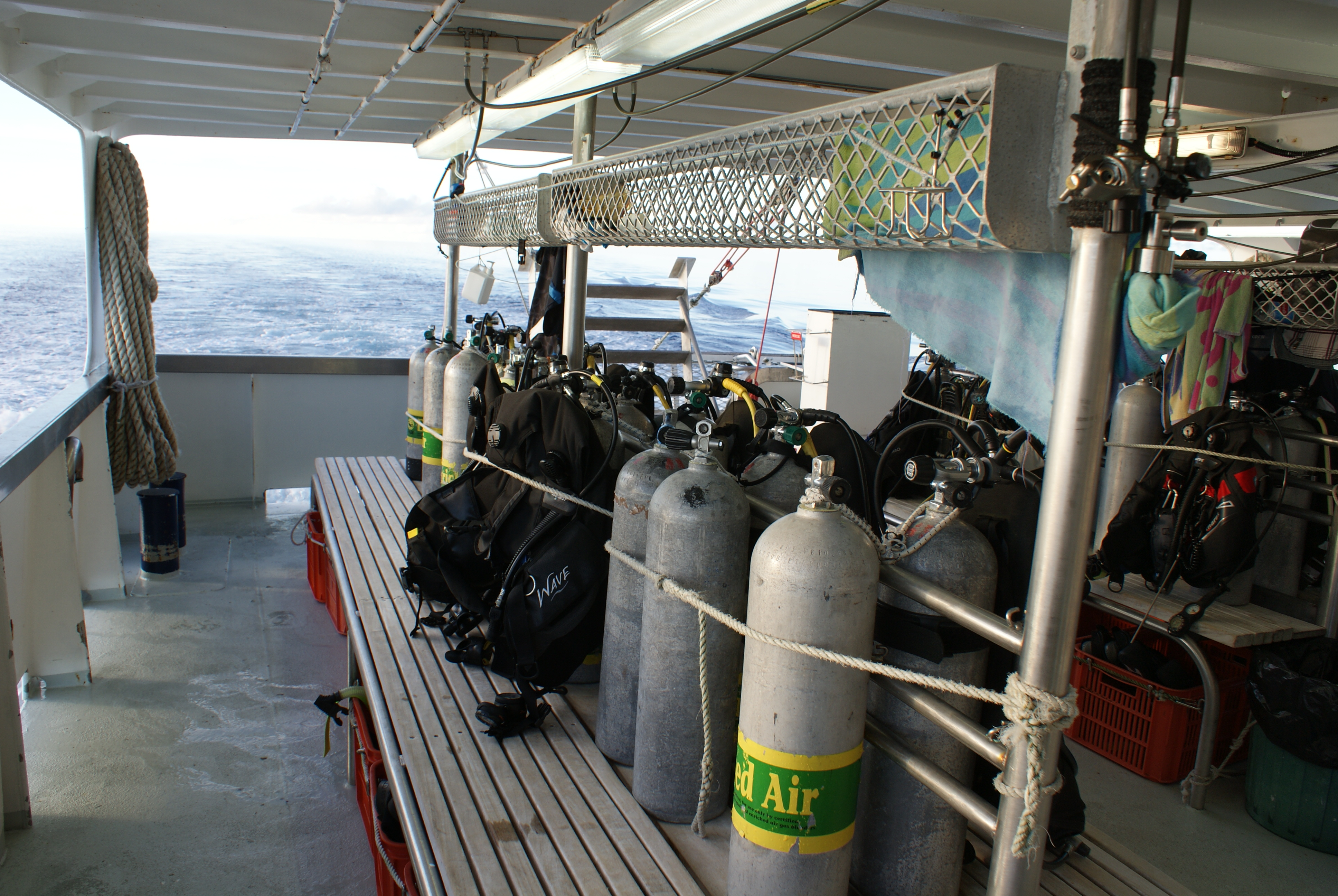 Blick auf das Tauchdeck der Taka. Eine Tauchsafariboot im Great Barrier Reef.